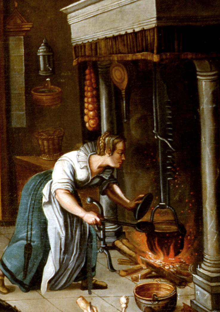 Scène de cuisine : dans une haute cheminée dont les montants verticaux sont deux colonnes au fût lisse et dont le manteau est bordé d’une brayère, une marmite en bronze est suspendue à une longue crémaillère au-dessus d’une forte flambée de bûches. Une femme aux cheveux châtains tressés en couronne, habillée d’un corsage blanc aux manches retroussées et d’une longue jupe bleue protégée par un tablier blanc, est penchée vers l’âtre et soulève de la main gauche le couvercle de la marmite comme pour vérifier l’état de la cuisson ou pour remuer le contenu du récipient avec la longue cuiller en bois qu’elle tient de la main droite. À l’avant-plan, une marmite à anse, vide, est posée à même le dallage clair. À gauche de la cheminée, où sont suspendus une tresse d’oignons séchés et un soufflet, un haut panier d’osier est posé sur un coffre de bois et un lave-main d’étain accroché au mur à côté d’un essuie-main perpétuel luit dans la pénombre de l’arrière-plan.